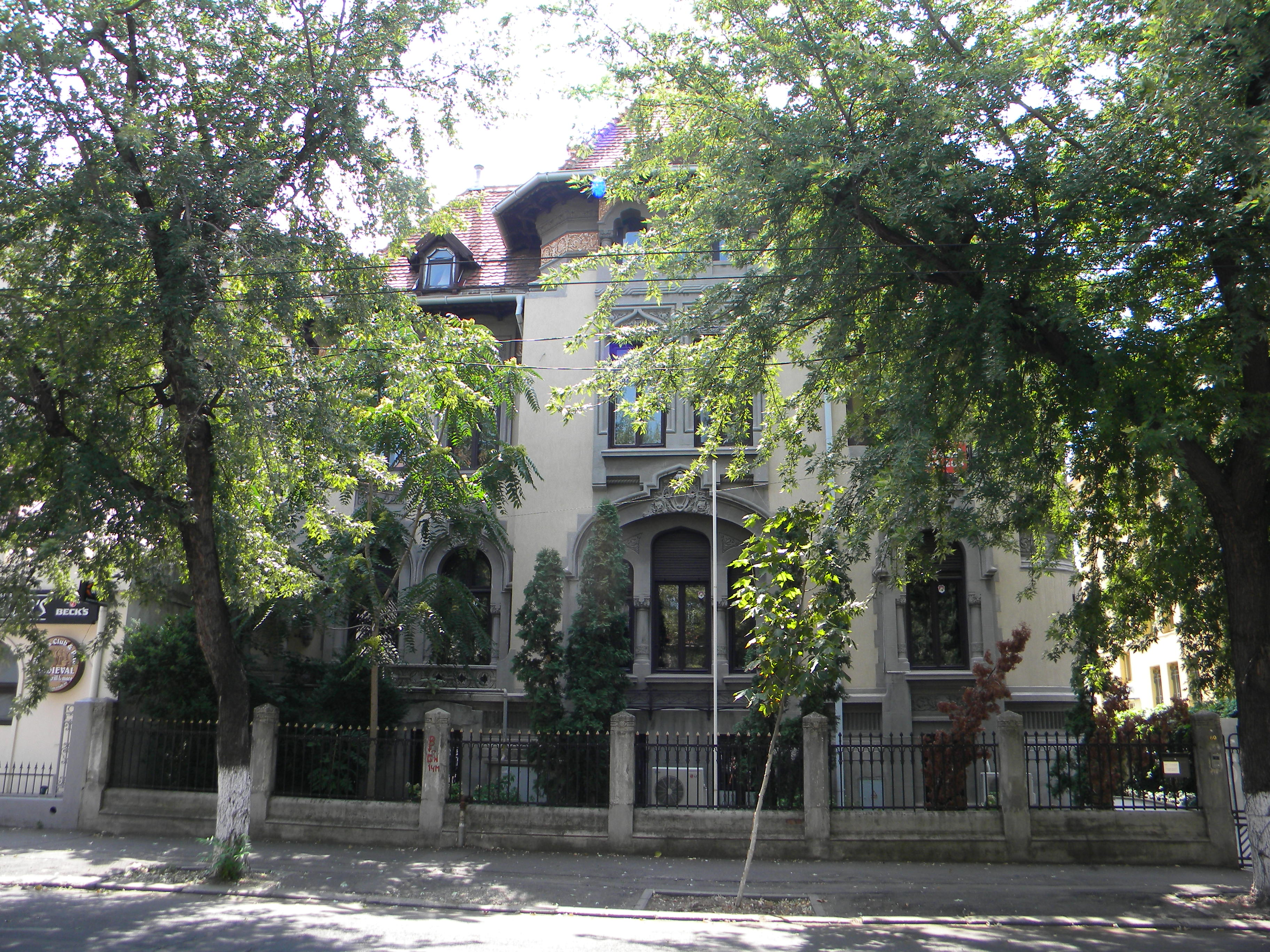 Casa pe Bd. Dacia nr. 60, Bucuresti, sect. 1